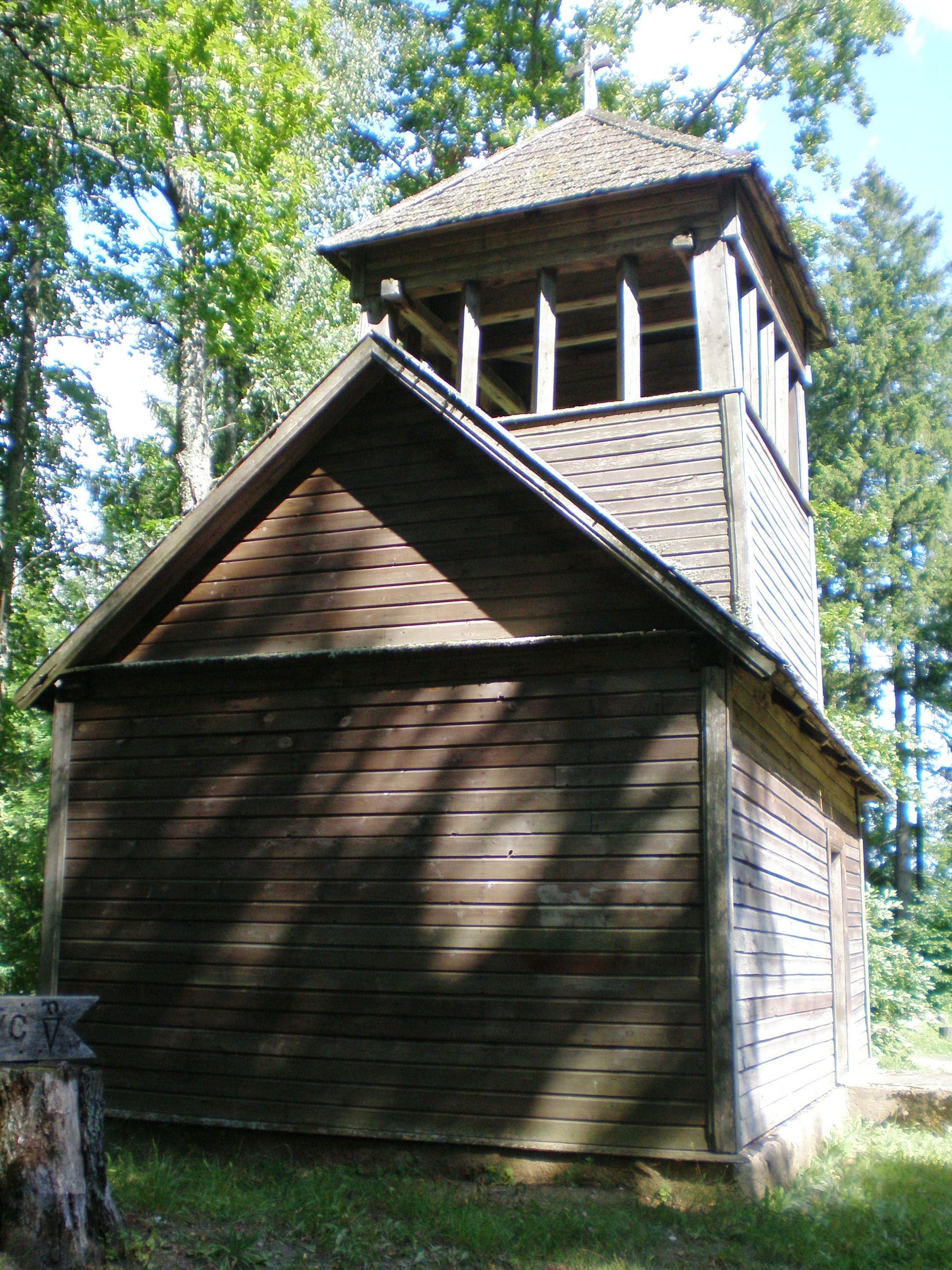 Stelmužės varpinė, Zarasų raj., Lietuva